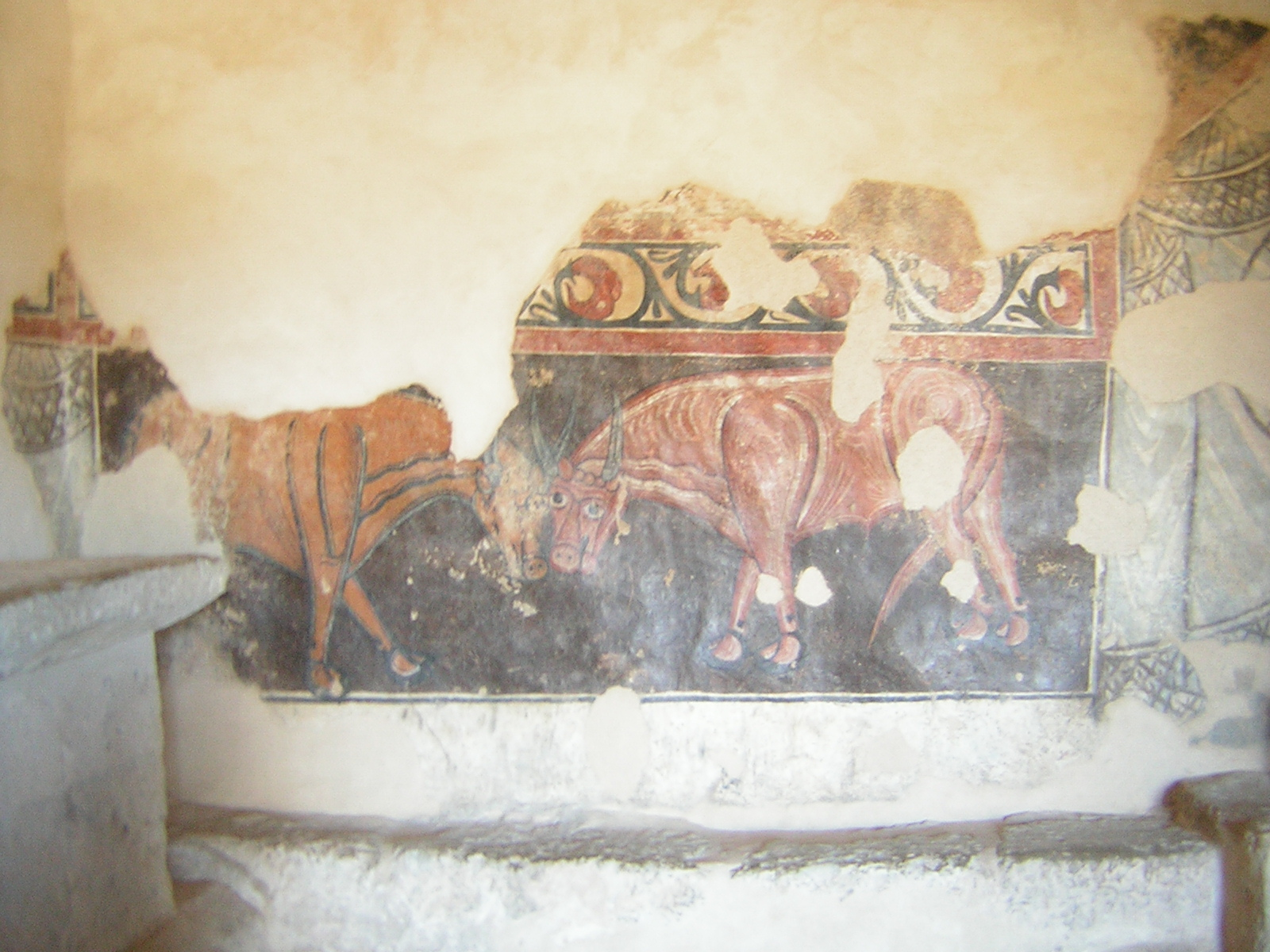 Ermita de San Baudelio, Casillas de Berlanga (Soria).